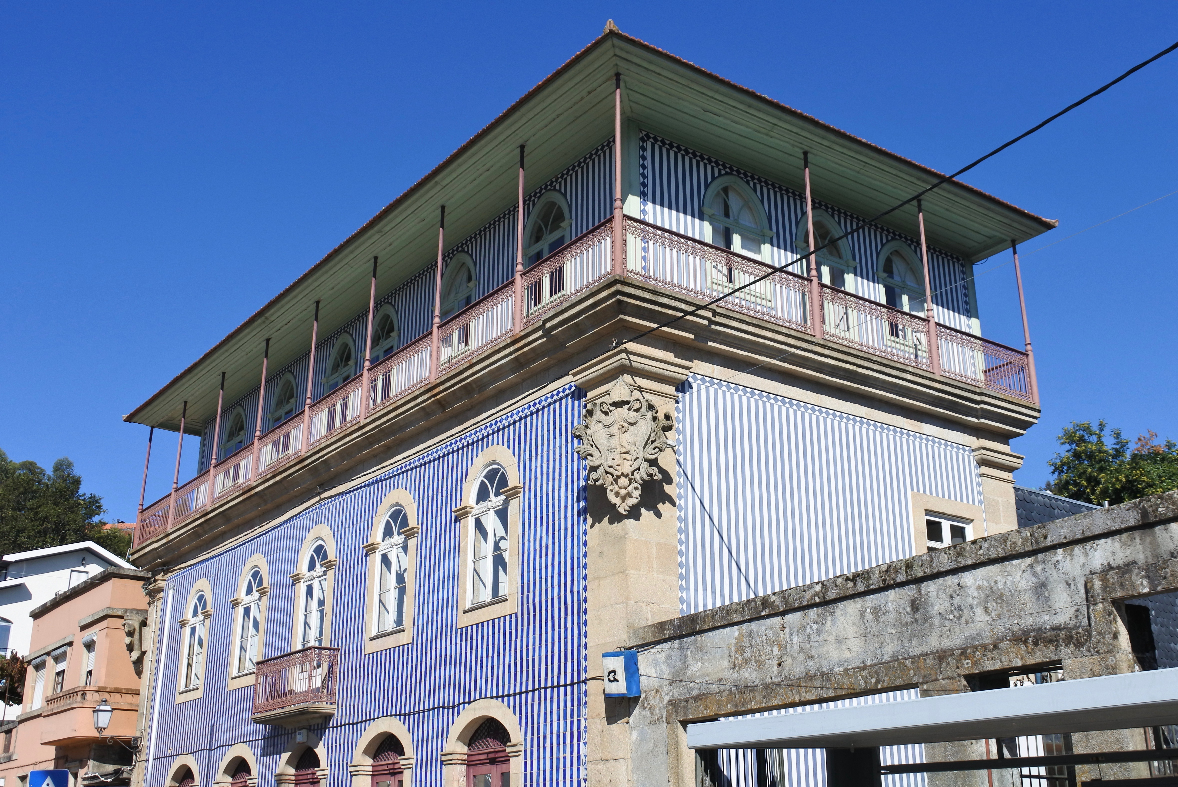 Main square, Cabeceiras de Basto